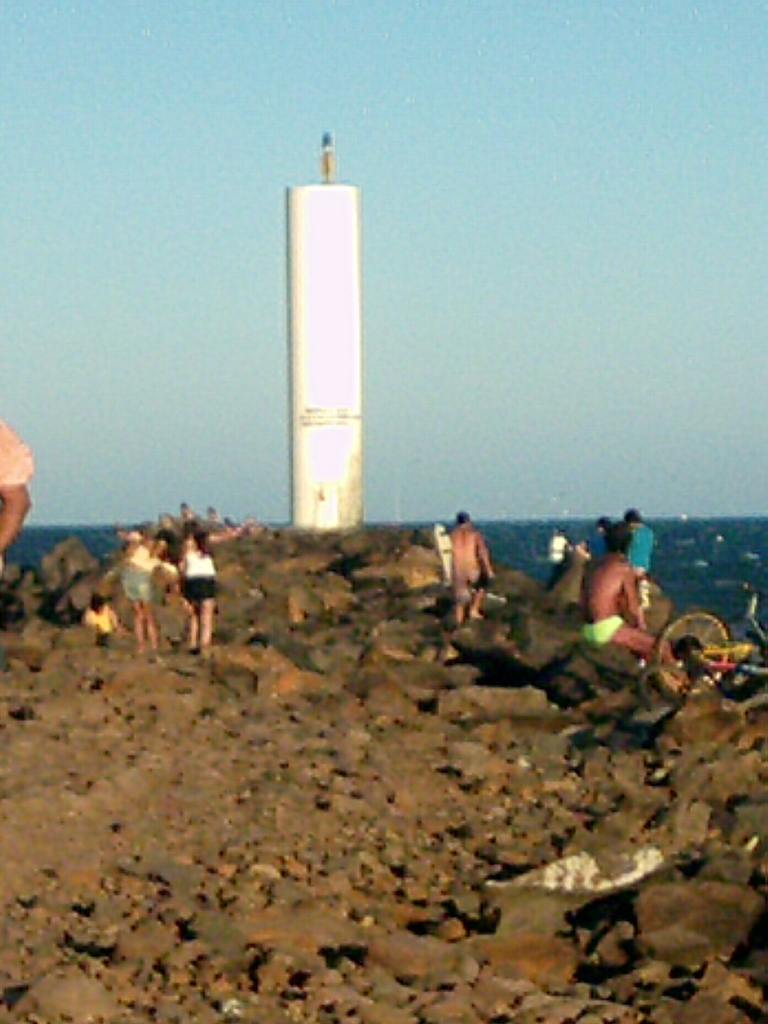 Farol do Molhe Sul de Mampituba - Torres, Brasil